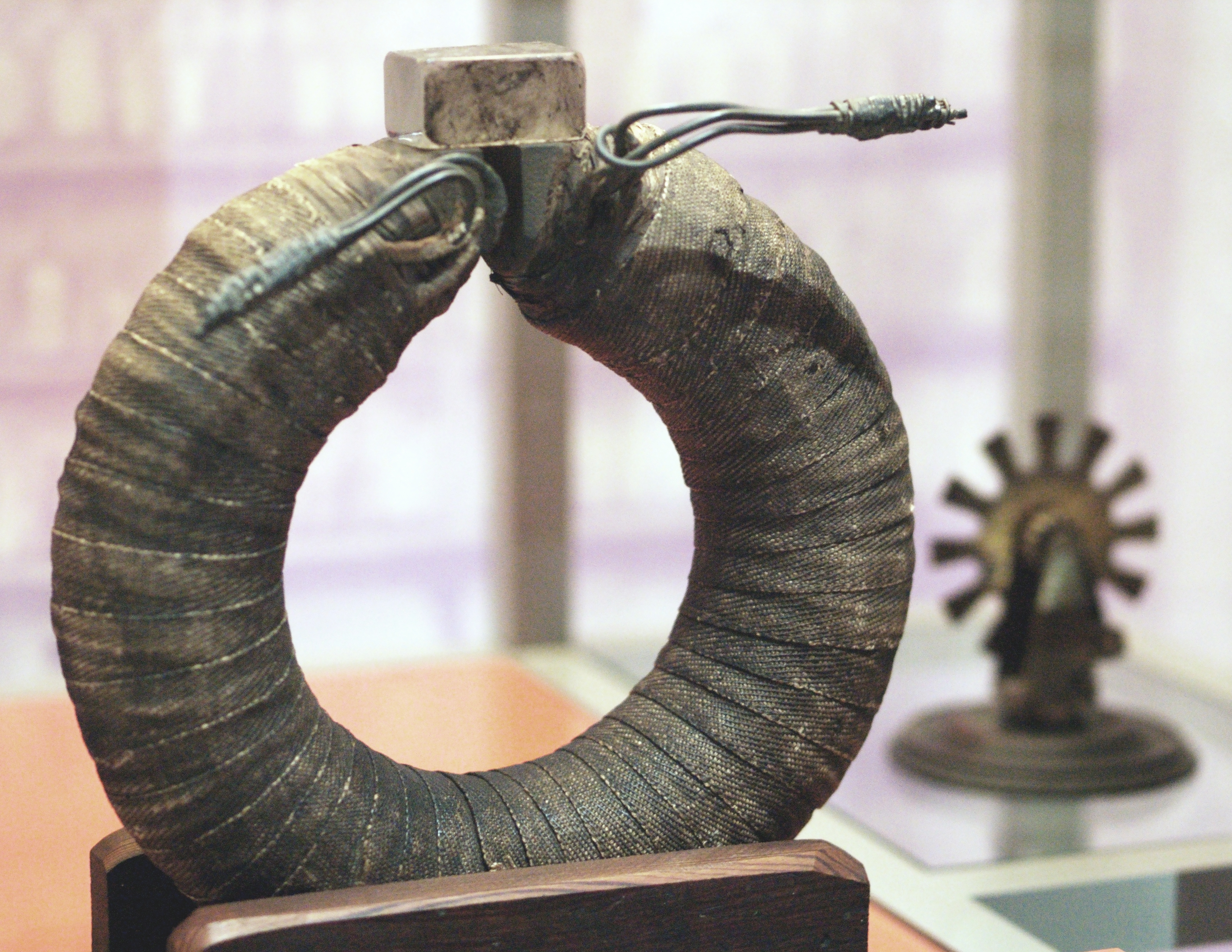 Faradeyev magnetski prsten.